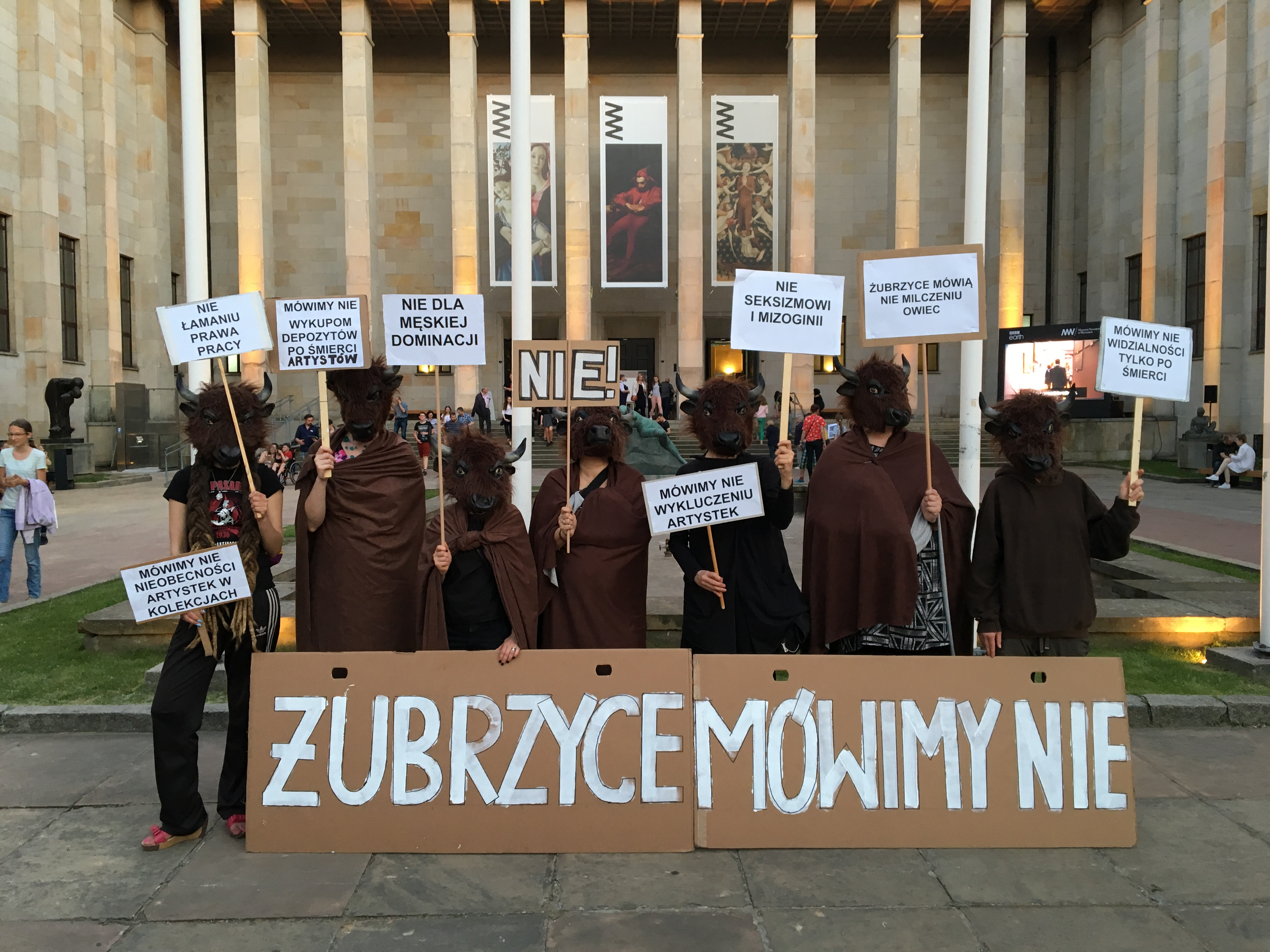 Zdjęcia grupy artystycznej performatywno-protestacyjnej "Żubrzyce Mówimy NIE". Performative 8: przed Muzeum Narodowym w Warszawie, 20 maja 2017, w kontekście braku sztuki kobiet w muzeach i braku wykupu depozytów dzieł sztuki od żyjących artystów.